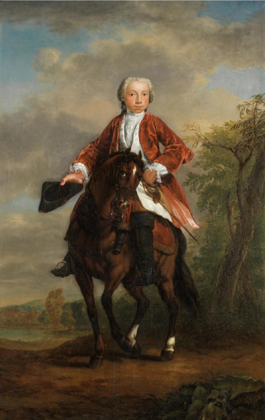 Portret van de 18-jarige Unico Allard Alberda van Menkema (1726-1790), het origineel bevindt zich in de collectie van het Groninger museum